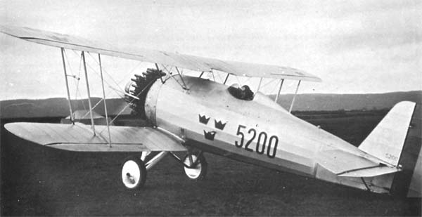 Svenska Aero SA-11 jaktfalken (Prototype J5) Avion militaire biplan suédois créer en 1929, qui donnera un an plus tard le J6.